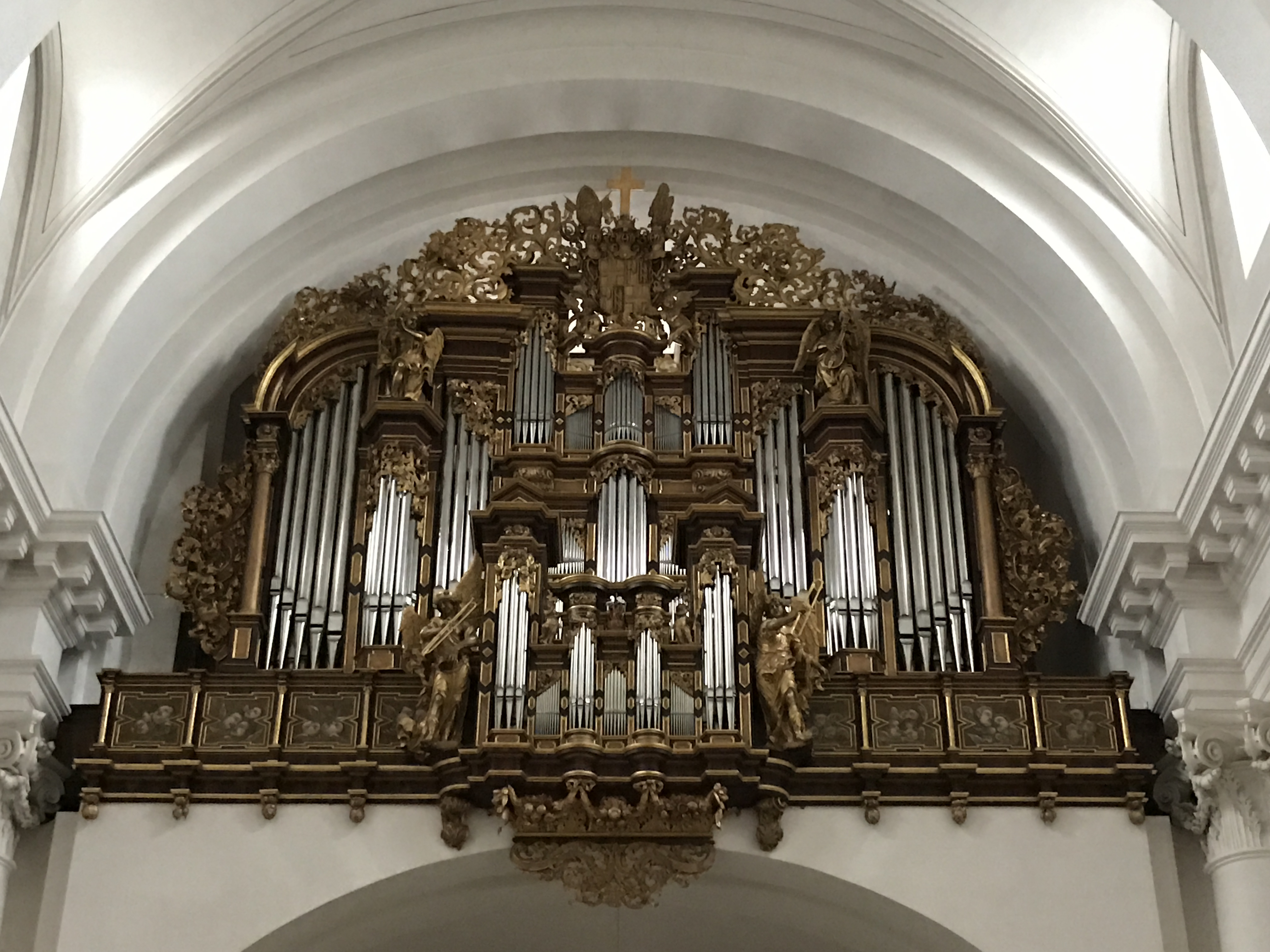 Orgel im Dom zu Fulda